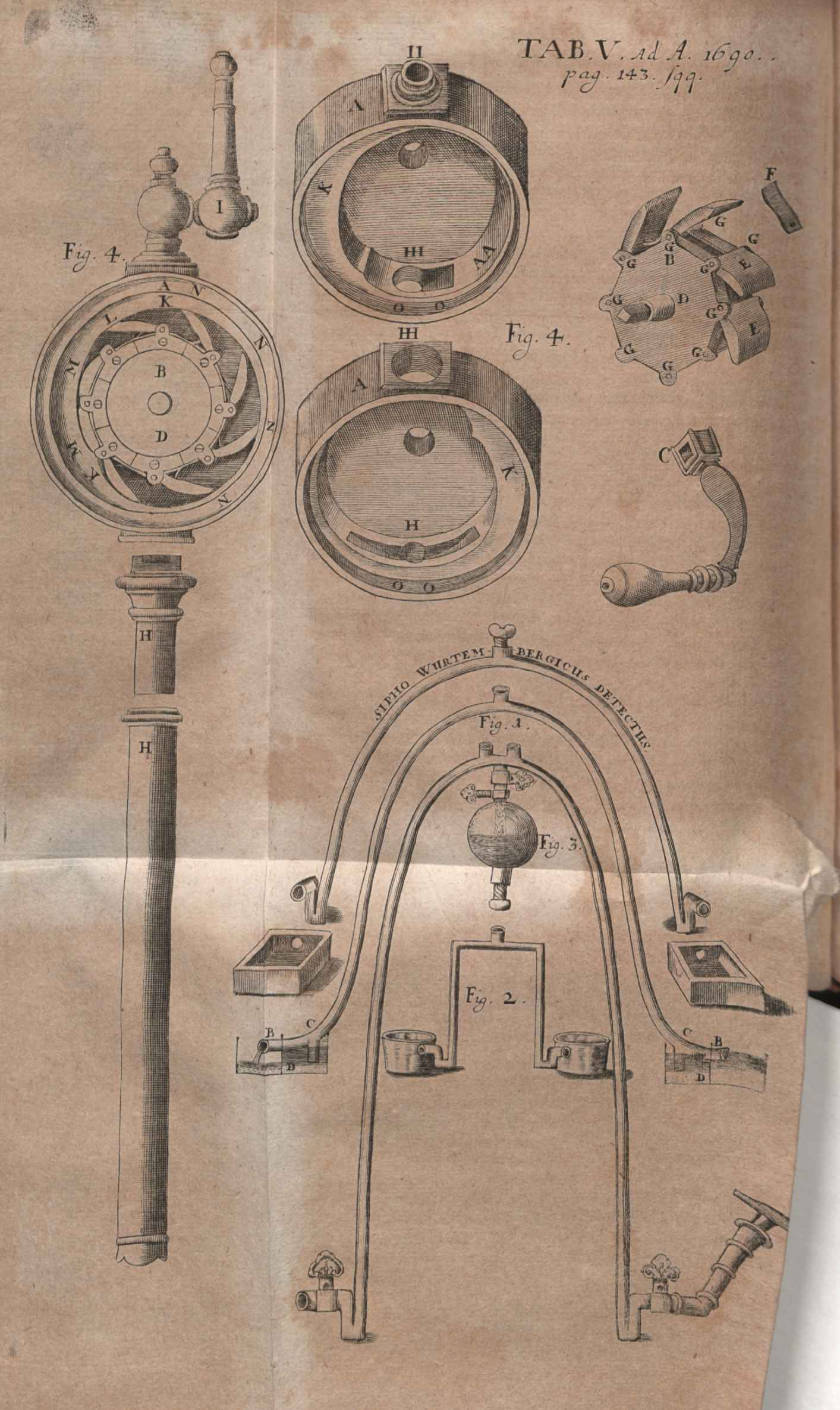 Illustration